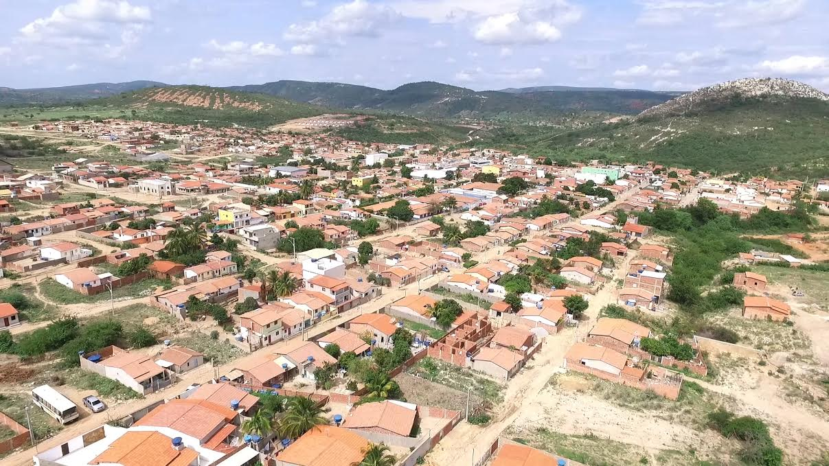 Registro aéreo da cidade de Caetanos. Ano 2017